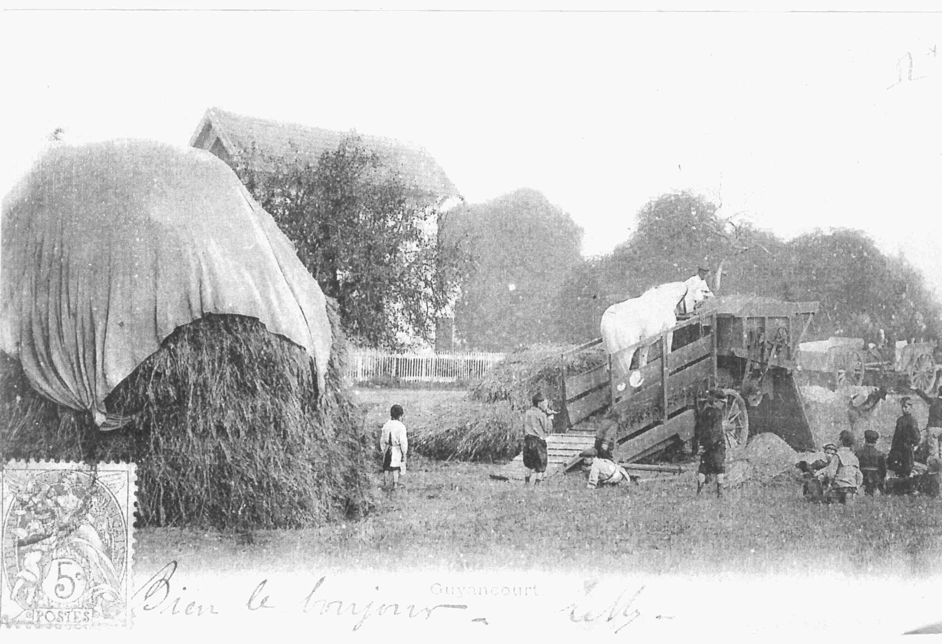 Travaux des champs à Guyancourt Carte postale dont je suis propriétaire